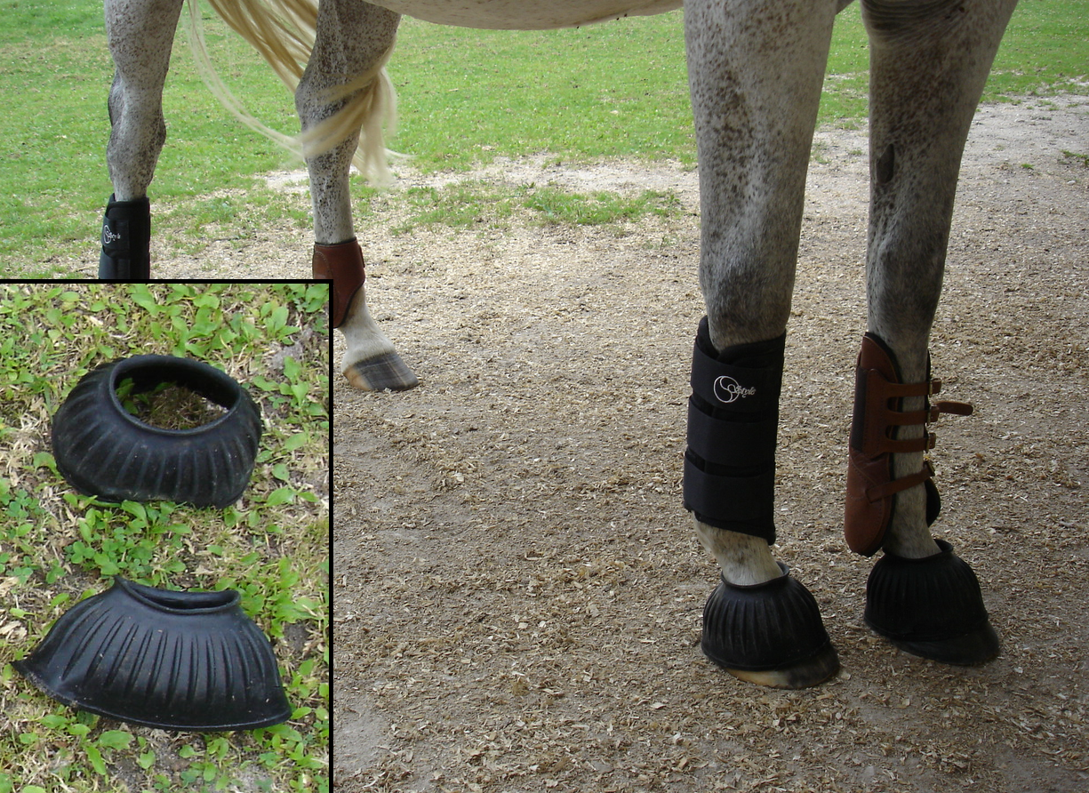 Spingglocken / Hufglocken